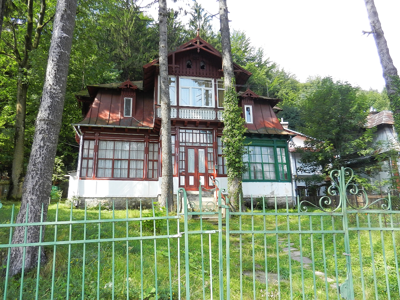 Casa Dumitru Economu